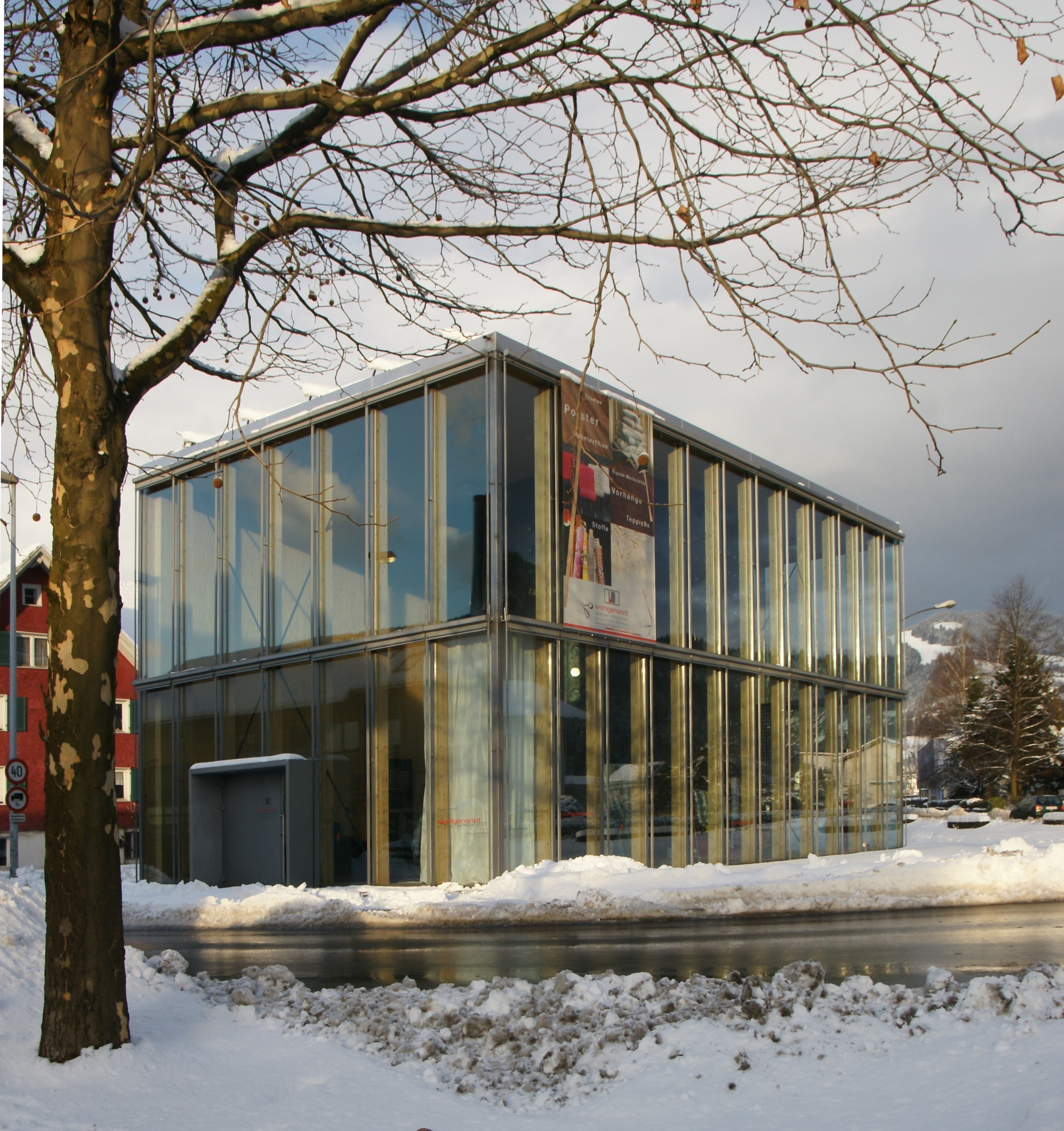 Der, von Architekt Peter Zumthor geplante, Klangkörper Schweizer Pavillon wurde für die Weltausstellung 2000 in Hannover aufgestellt und dient heute einem Innenausstatter als Geschäftsraum an der Hatlerstraße 77 in Dornbirn.